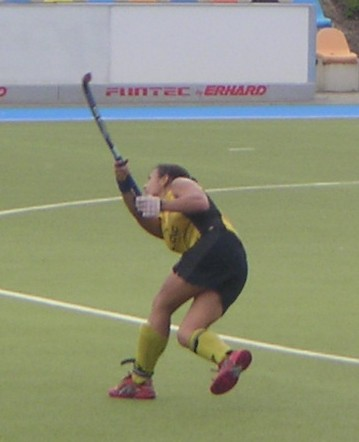 Tina Bachmann after a drag flick